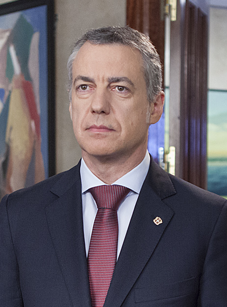 El lehendakari confía en crecer juntos y crear empleo en 2015